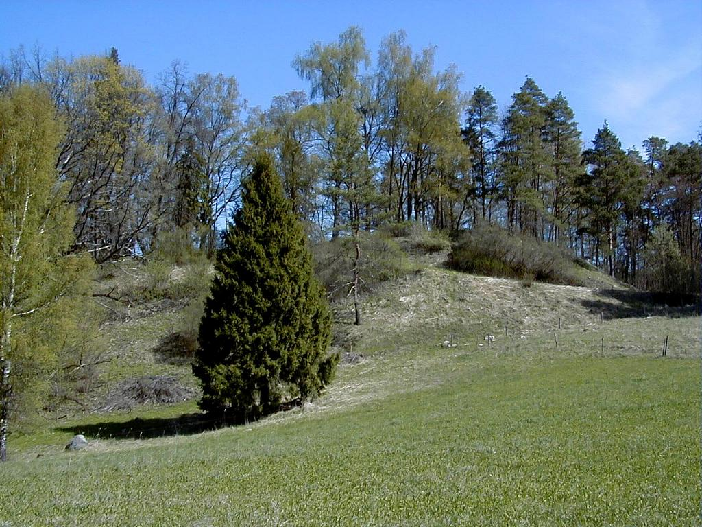 Plāteres pilskalns 2003-05-10